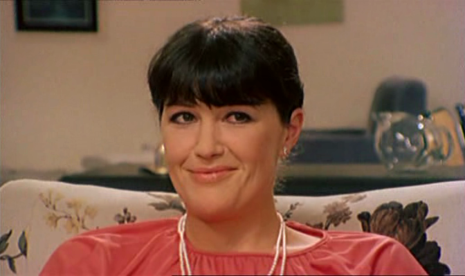 Screenshot del film L'infermiera di notte (1979).